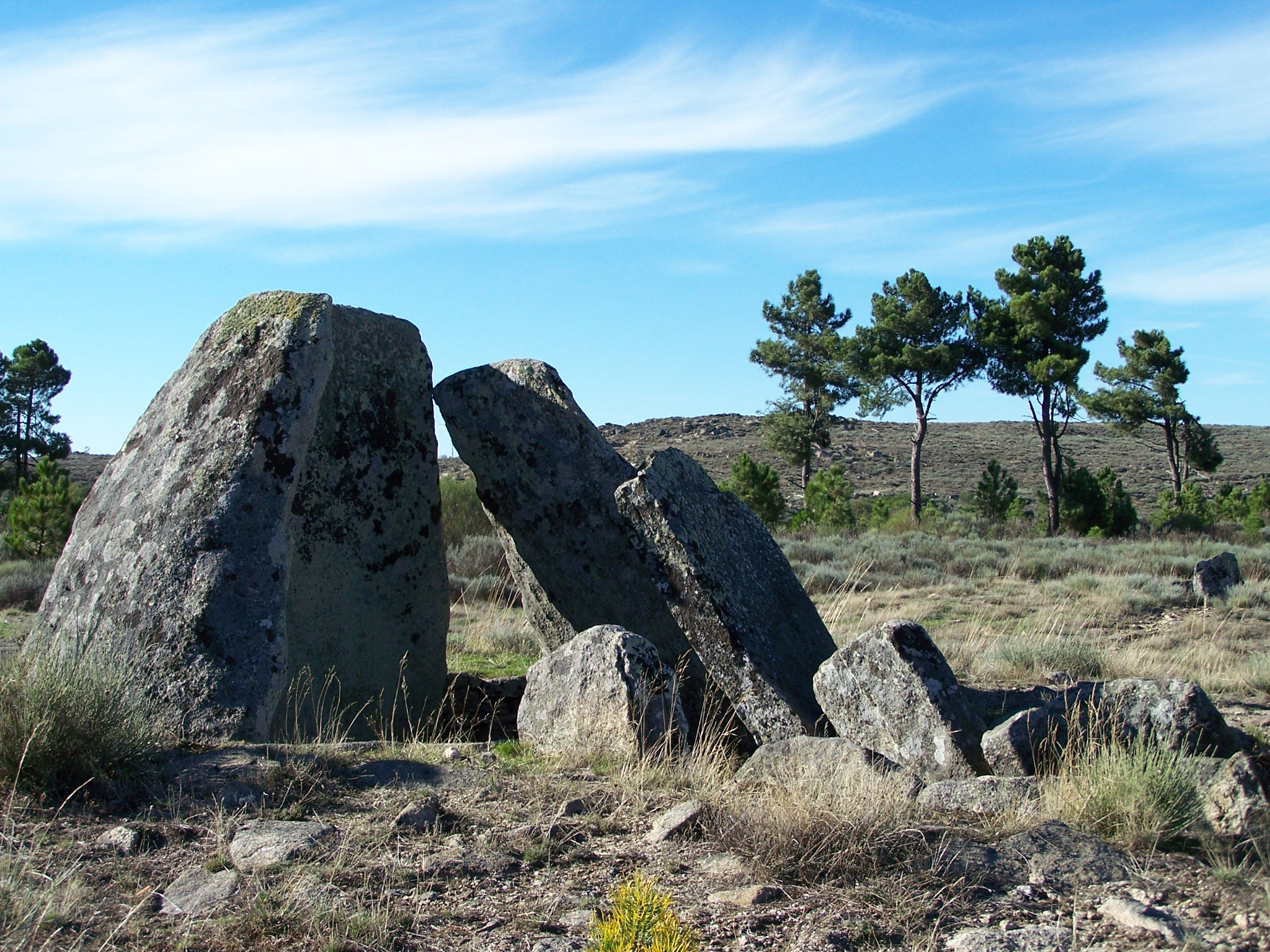 Necrópole megalítica Lameira de Cima, freguesia de Antas, Penedono, Portugal. Vista para dólmen.